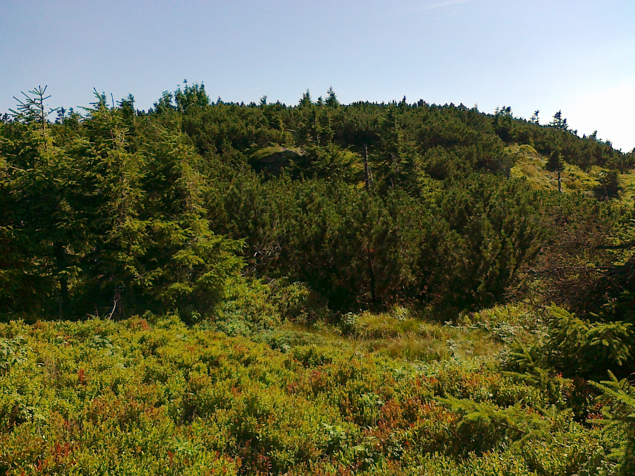 Widok na zarośnięty szczyt góry Červená hora - 1333 m